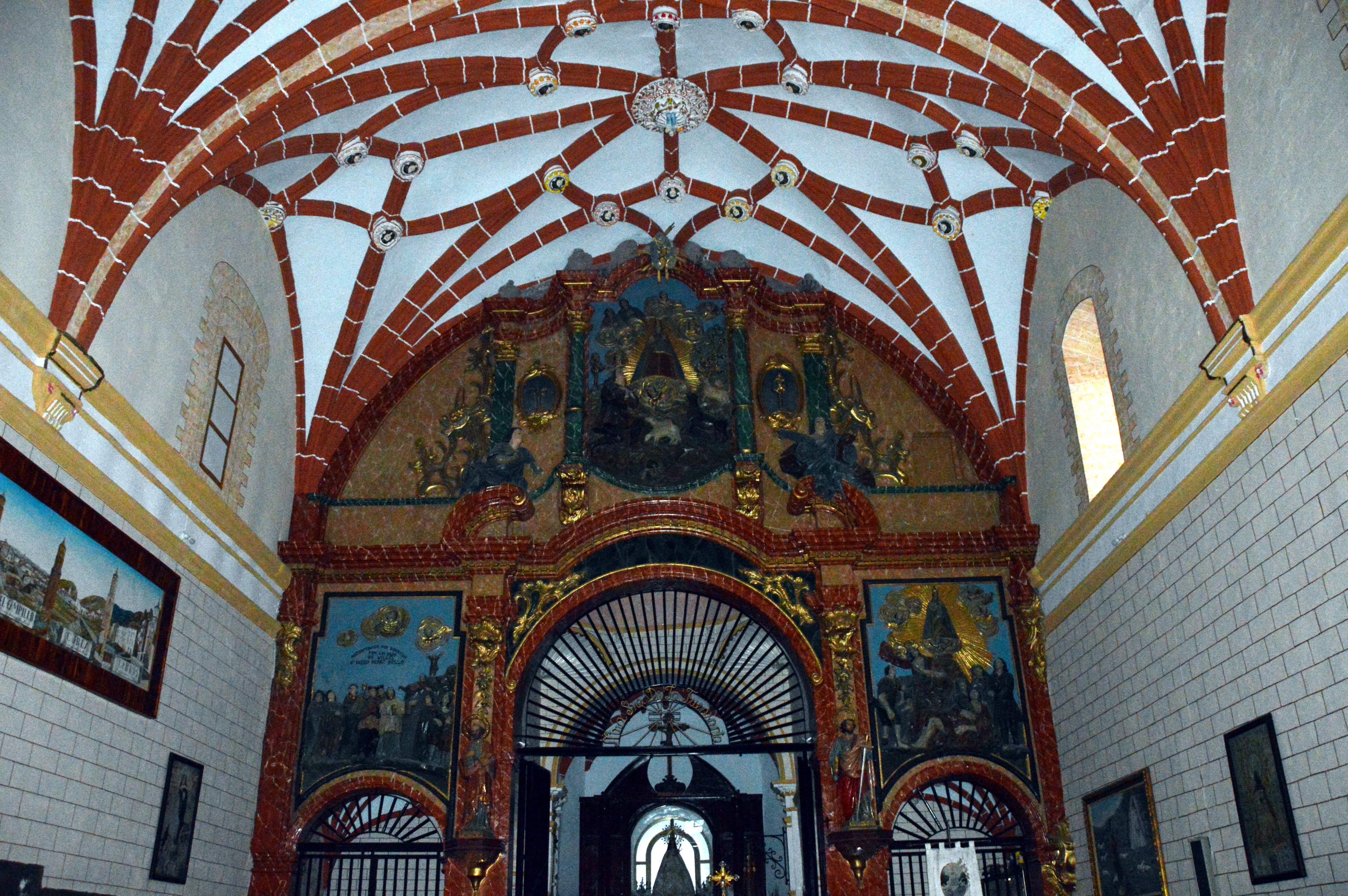 Nave del Santuario de la Fuensanta en Villel (Teruel), con el presbiterio al fondo (2019).